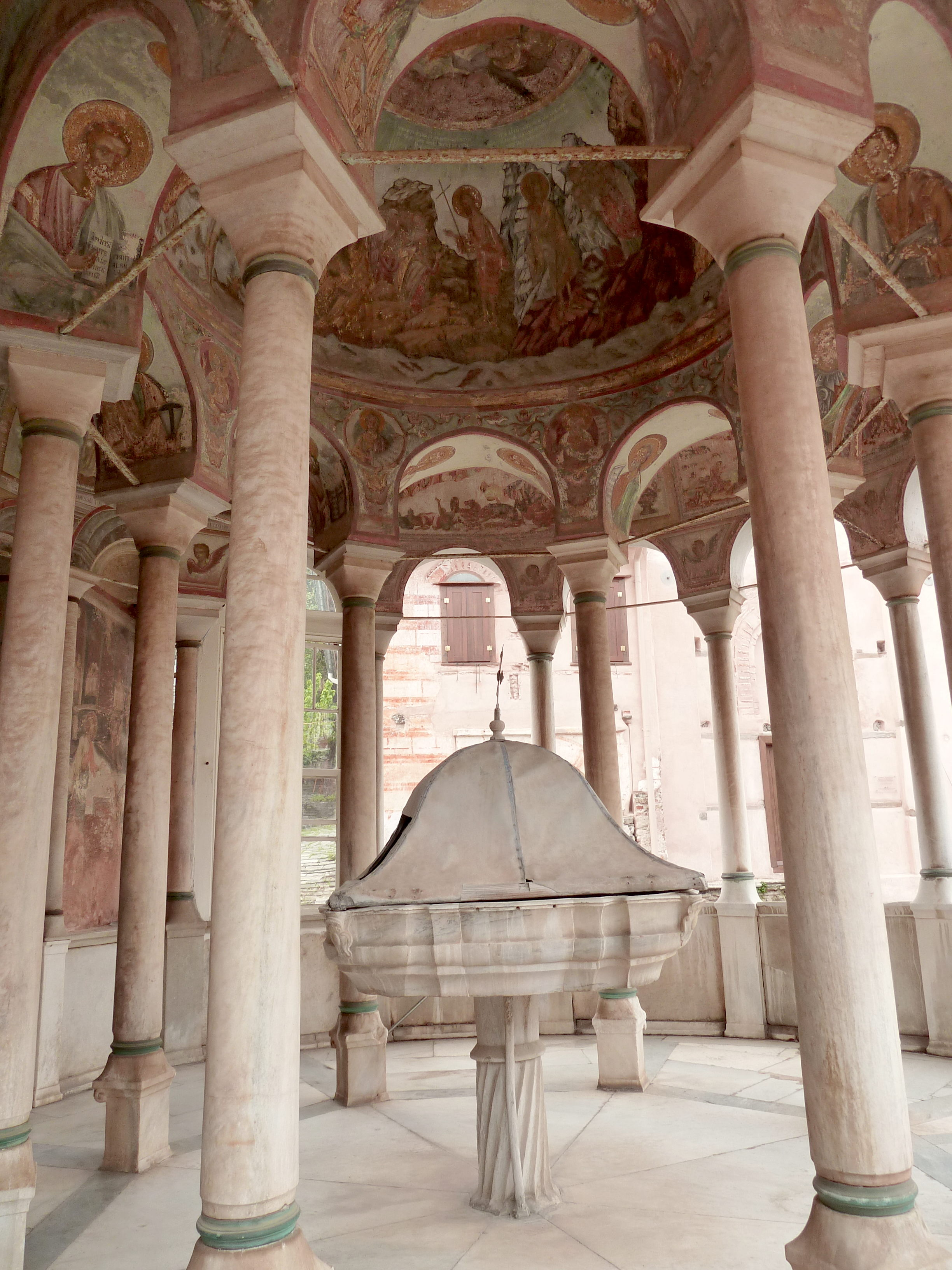 Phiale (fontaine rituelle) devant le Catholikon du monastère de Vatopedi (Mont Athos)